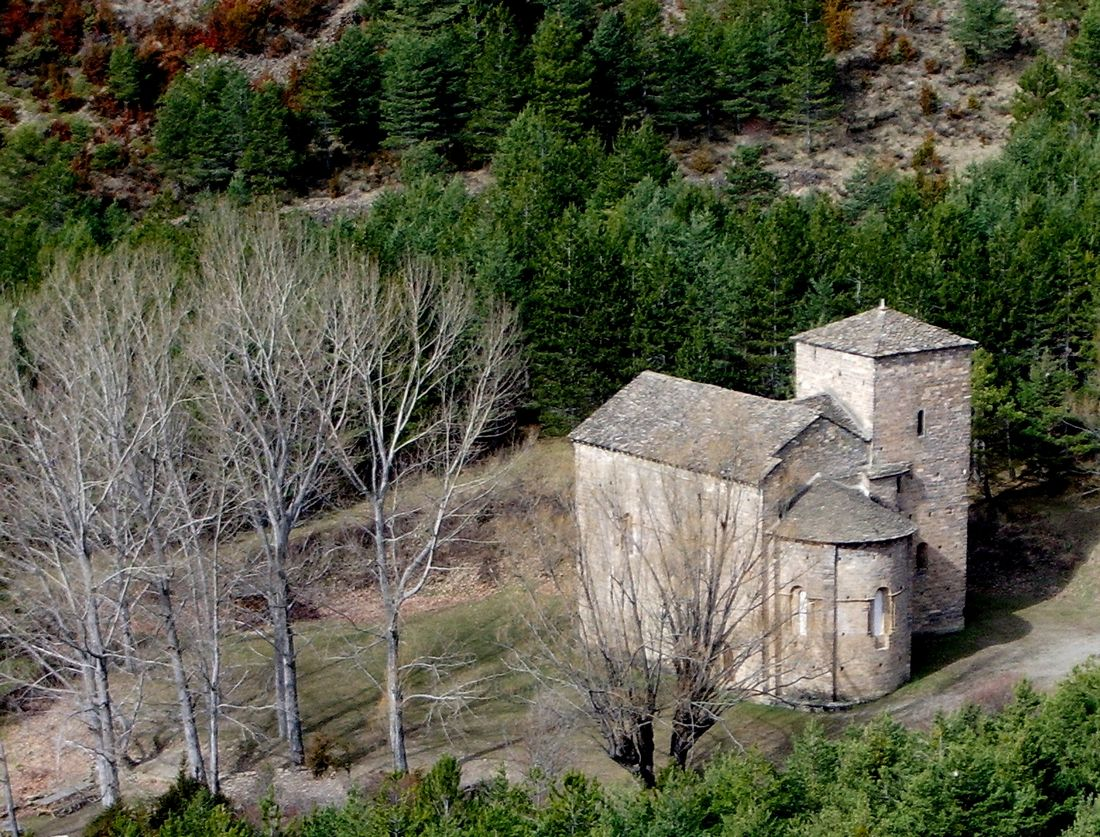 Ermita románica del siglo XI